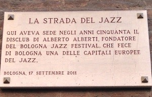 Targa commemorativa apposta in via Caprarie a Bologna per ricordare Alberto Alberti e il suo Disclub